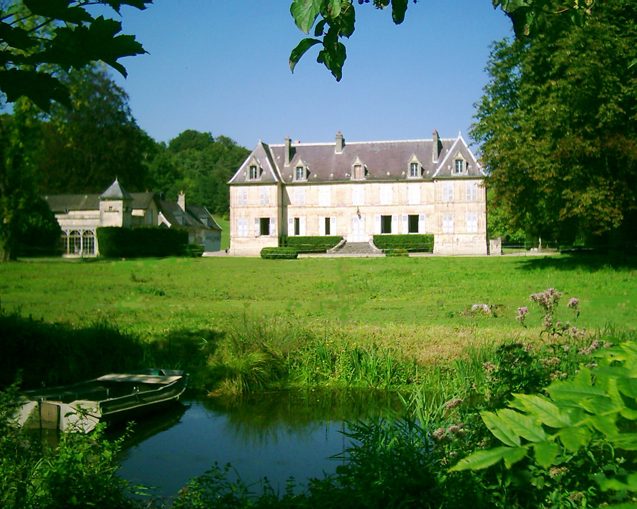 Château de la Mothe sur la commune de Béthisy-Saint-Martin